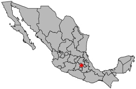 Locatie van Buenavista (Mexico), zelf gemaakt